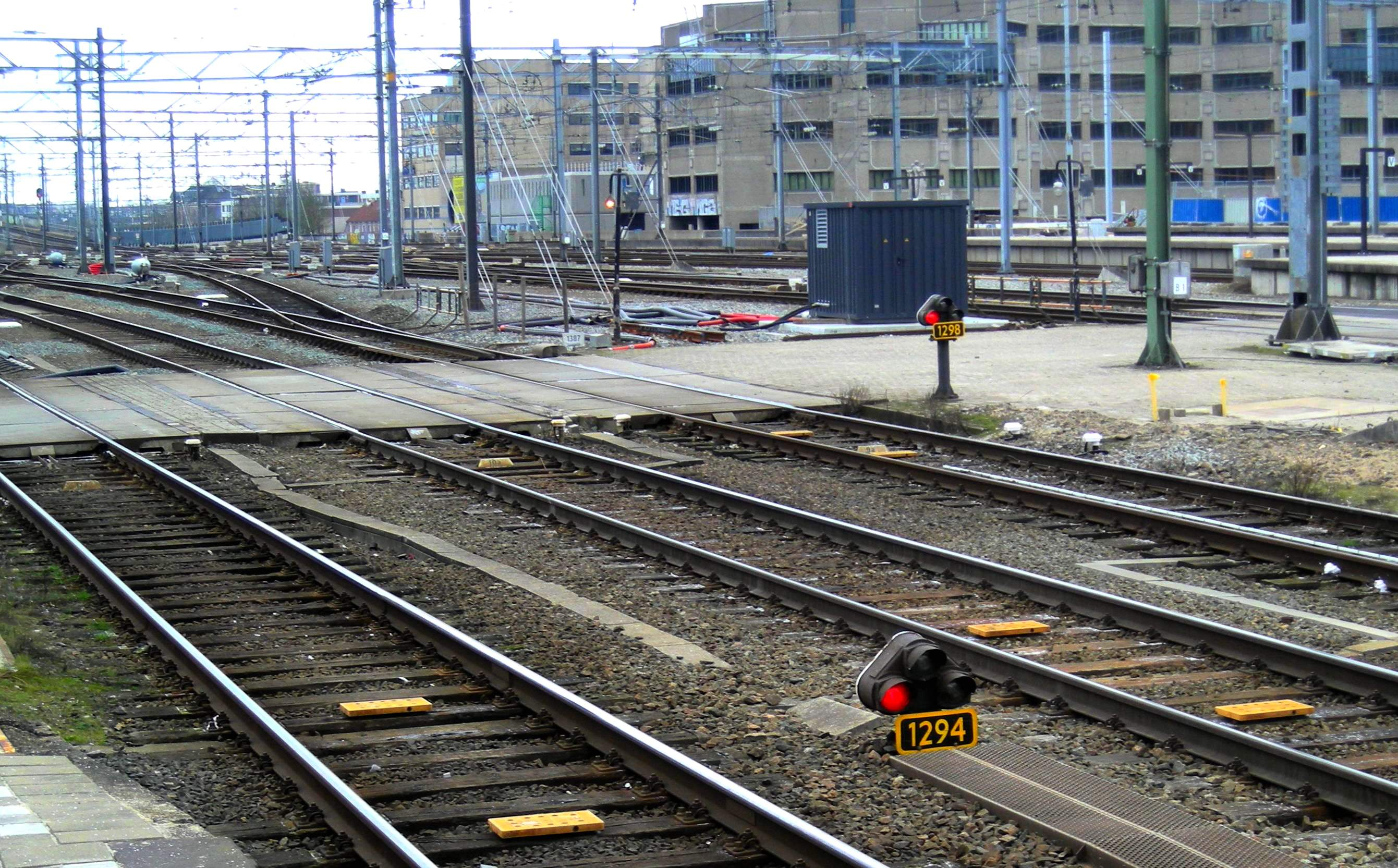 Eurobalises Utrecht CS noordzijde sporen 9-11, zichtbaar vanaf het perron. Op deze plaats begint de aanmelding van treinen met ERTMS voor het (ook) met ERTMS beveiligde baanvak Amsterdam - Utrecht